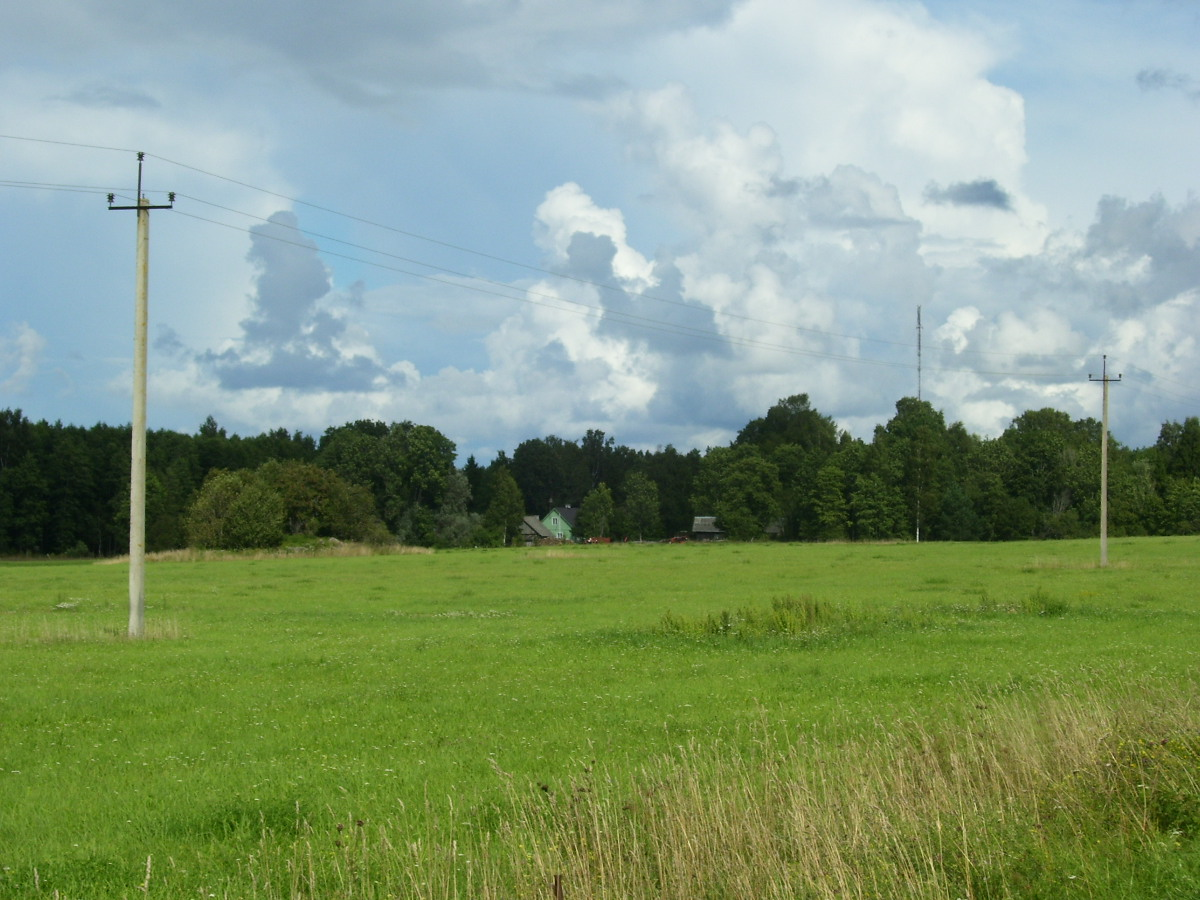 Kopli talu, Harju küla, Pühalepa vald, Hiiu maakond; vaade Partsi-Kuri teelt